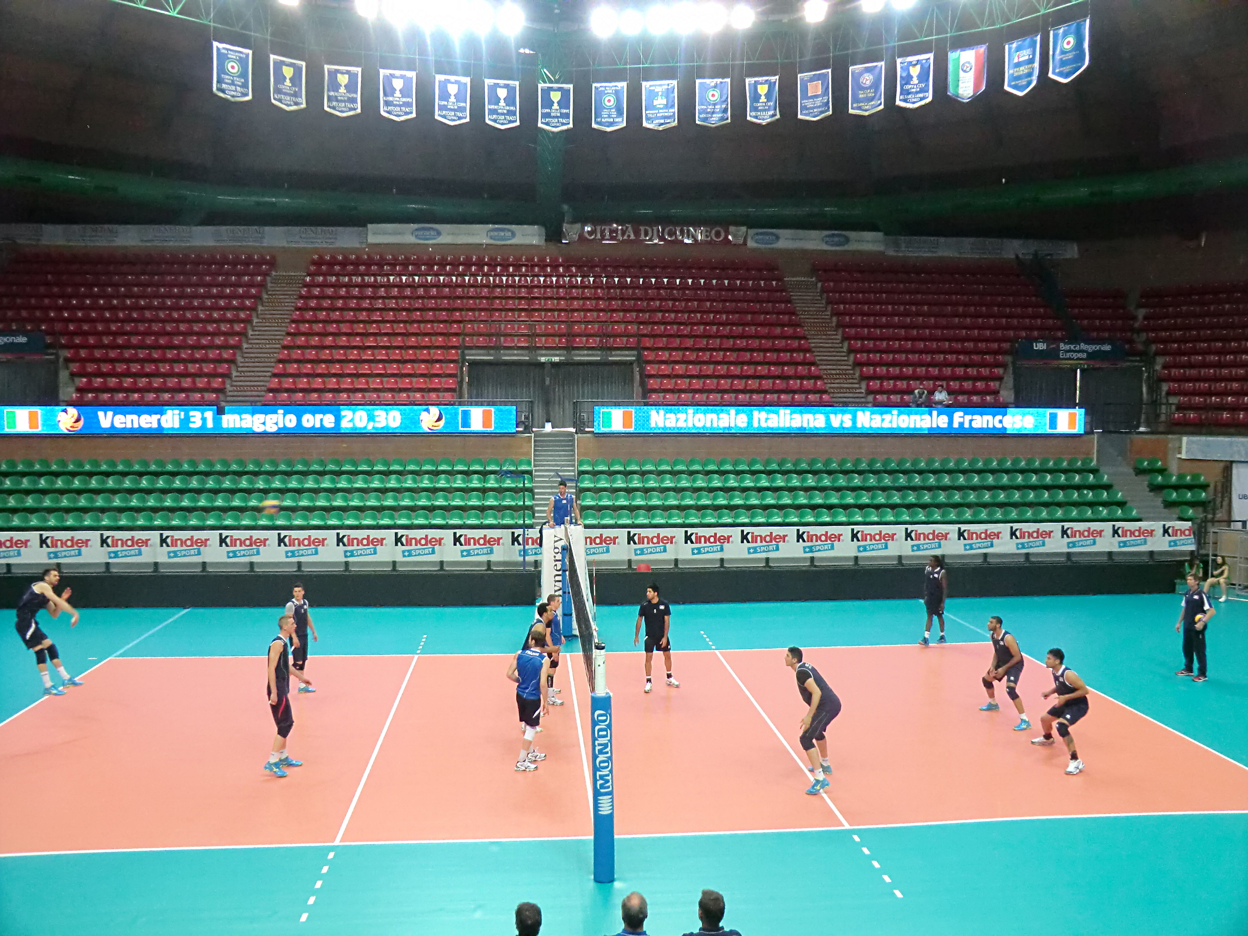 Nazionale francese di pallavolo maschile in allenamento prima della sfida amichevole con la nazionale italiana presso il Palazzetto dello sport di Cuneo (30/05/2013)